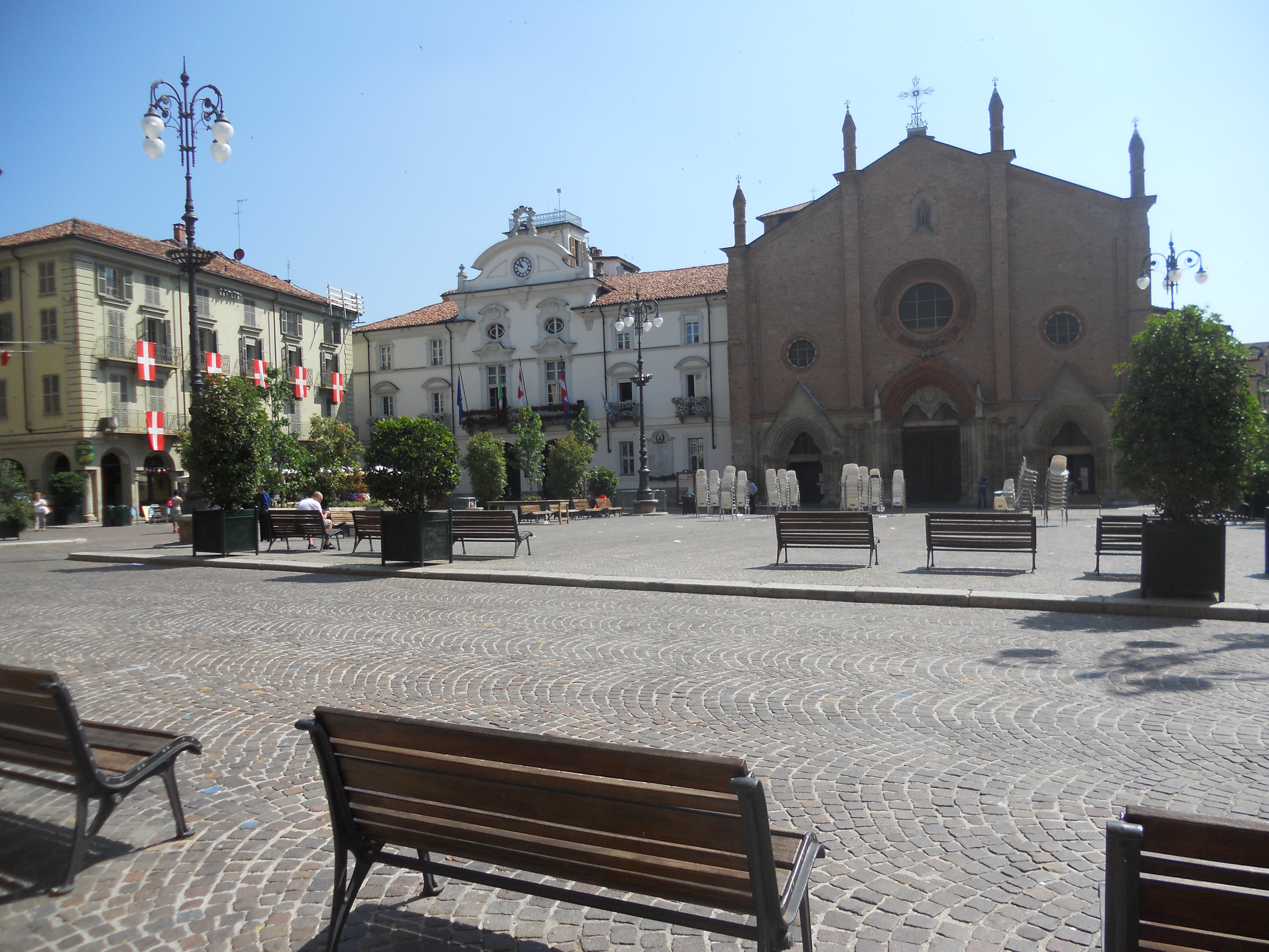 veduta su piazza san secondo con la collegiata dedicata al santo omonimo e la facciata del palazzo del municipio This is a photo of a monument which is part of cultural heritage of Italy.